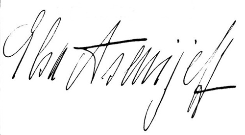 Signatur der Schriftstellerin Elsa Asenijeff aus dem Jahr 1905